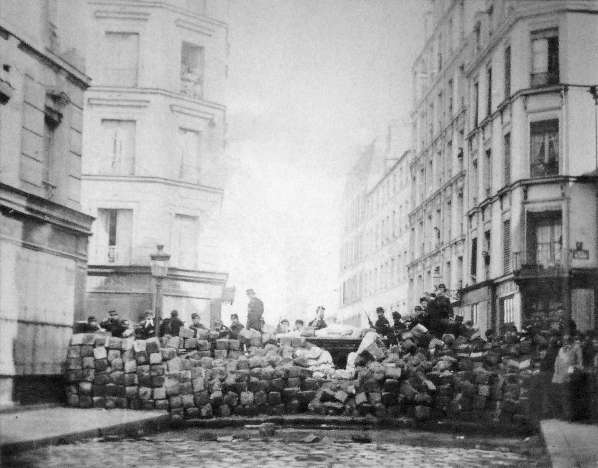 Exposition La Commune de Paris à l'Hôtel de Ville de Paris (18 mars - 28 mai 2011) - Barricade rue Sedaine au carrefour de la rue Saint-Sabin - Bibliothèque historique de la Ville de Paris.